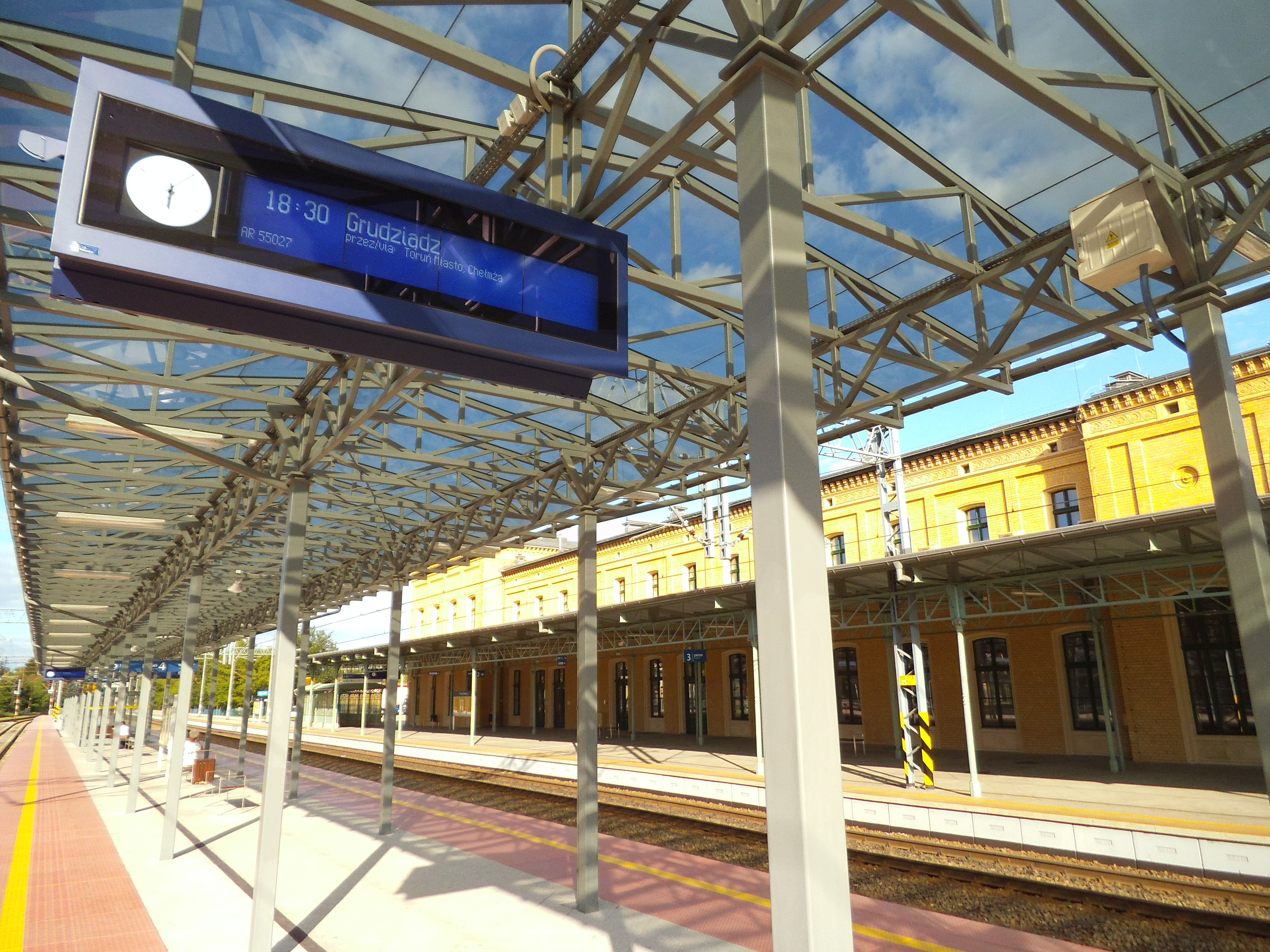 Toruń Główny89